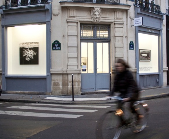 Vue extérieure